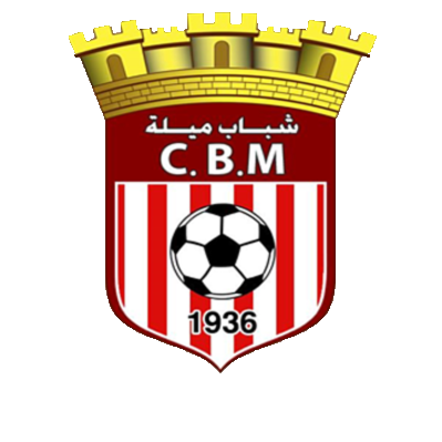 شباب ميلة